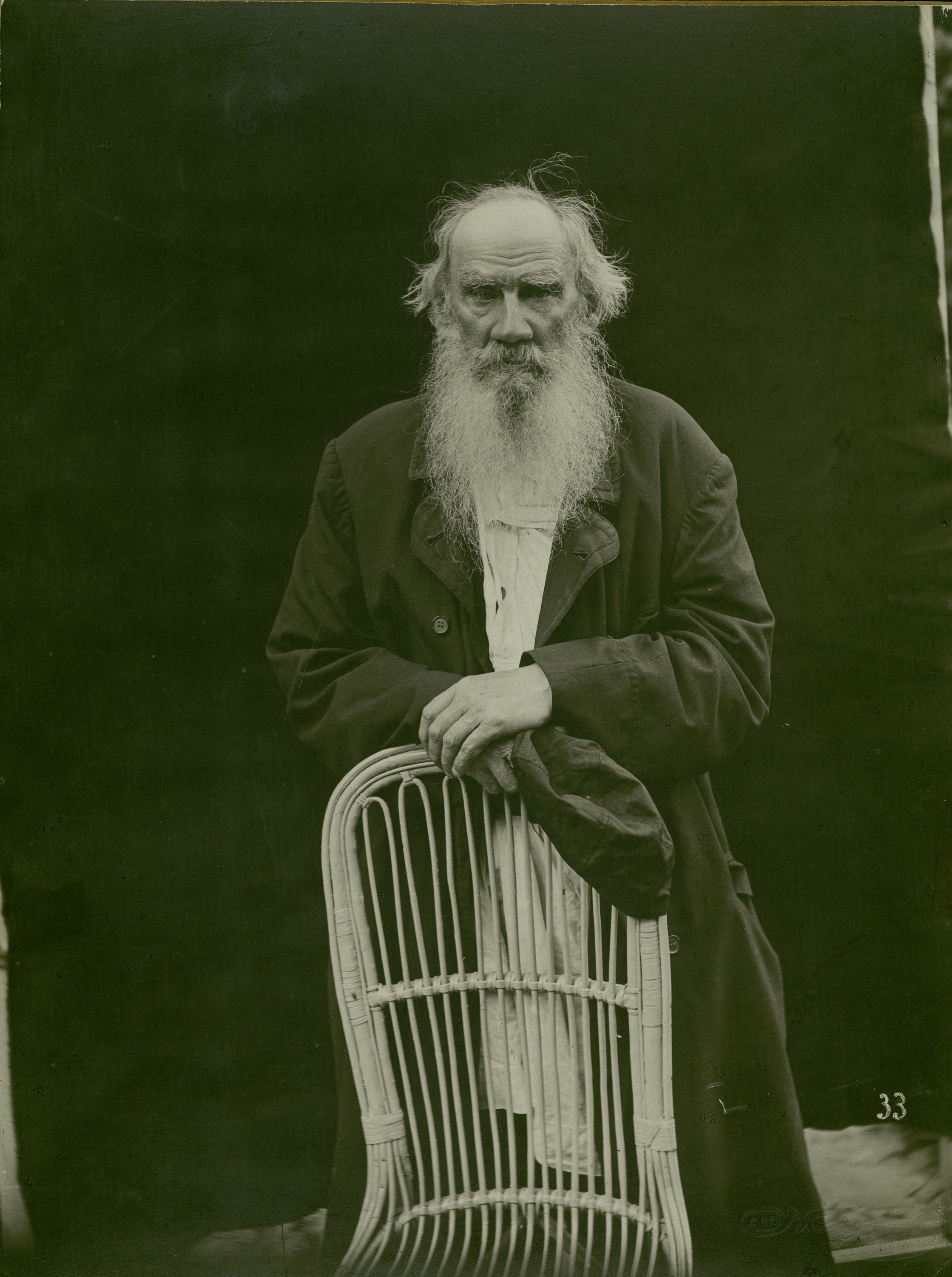 Поколенный портрет Л.Н. Толстого, фас, в чёрном пальто поверх белой блузы. Стоит, опираясь сложенными кистями рук на спинку плетёного кресла, в правой руке – чёрная шапочка. На тёмном фоне. 1908 г., Ясная Поляна